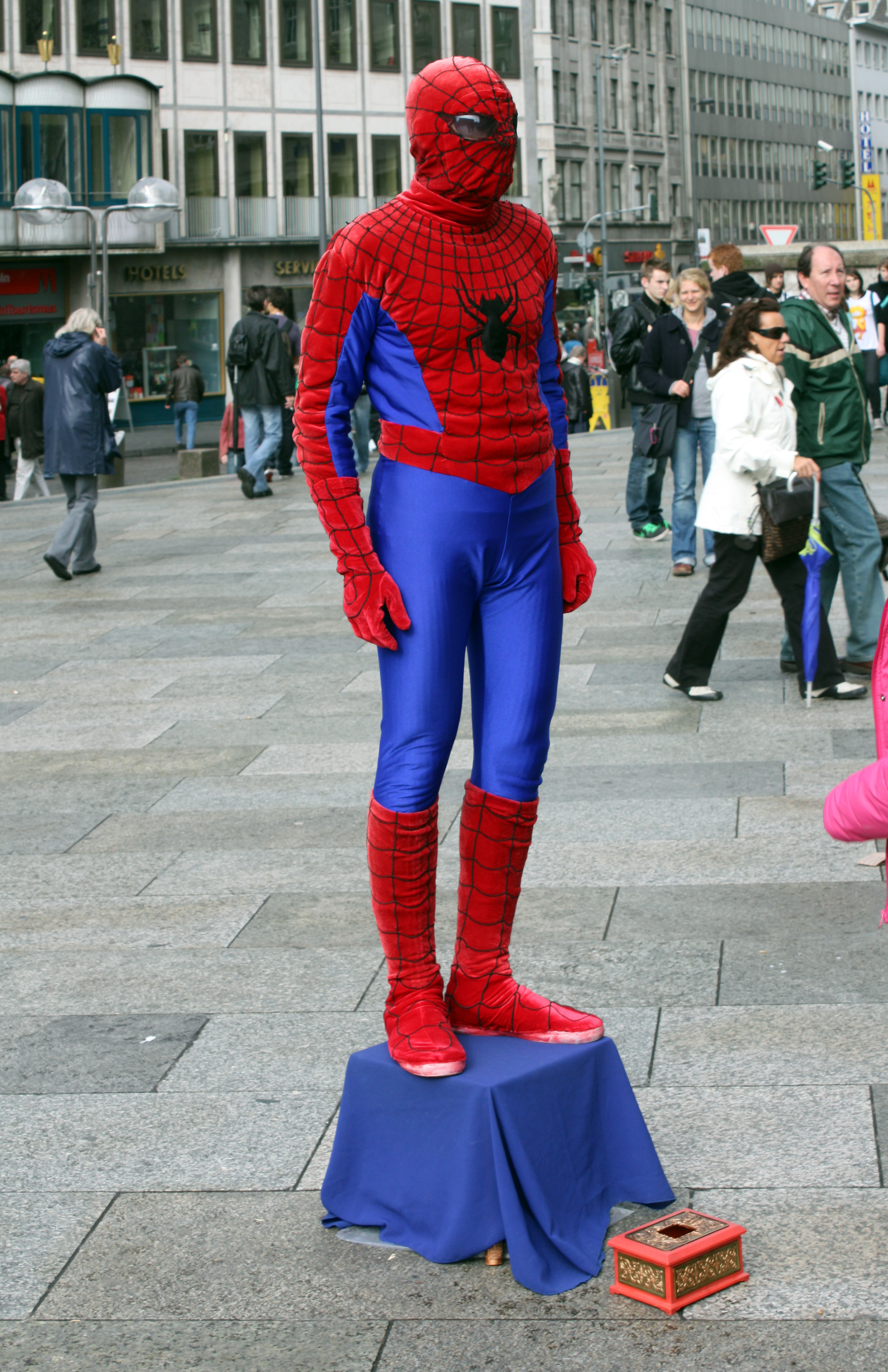 Kölner Domplatte, unbekannter Darsteller